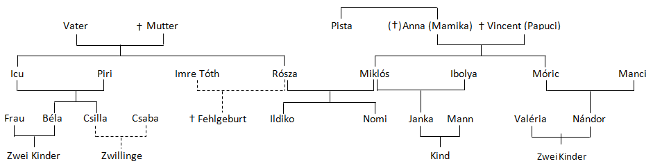 Stammbaum der Familie Kocsis aus Melinda Nadj Abonji's Roman "Tauben fliegen auf"